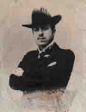 Cav.-Francesco-Orsini